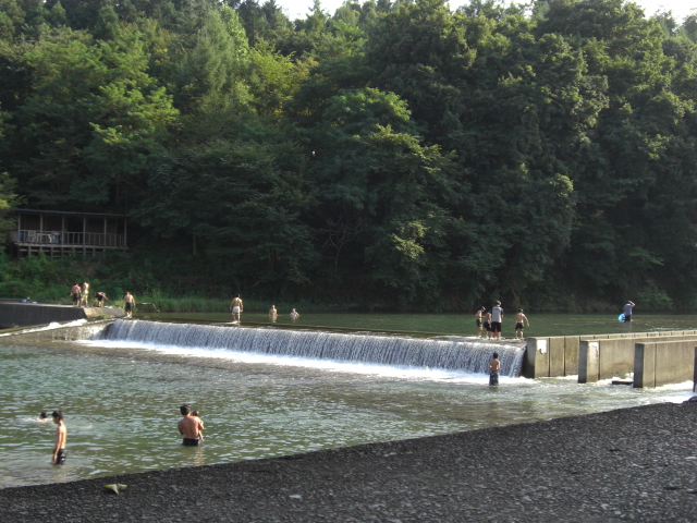 「山田取水堰」。東京都あきる野市山田にある秋川の堰。山田大橋のほぼ直下。左岸から撮影。地図はこちら。